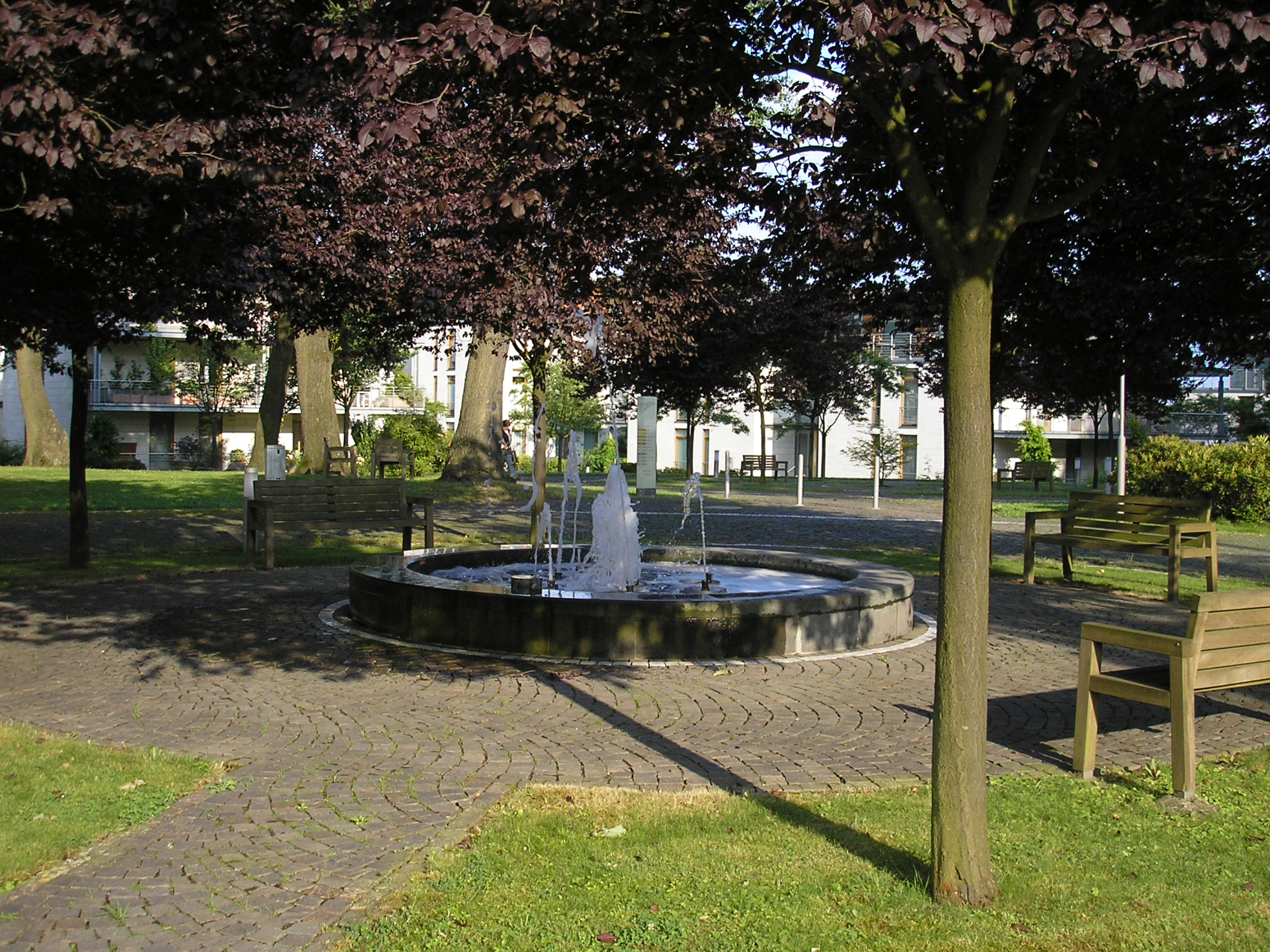 Schloss Bensberg, Brunnen im Schlosspark ( Medici-Platz )